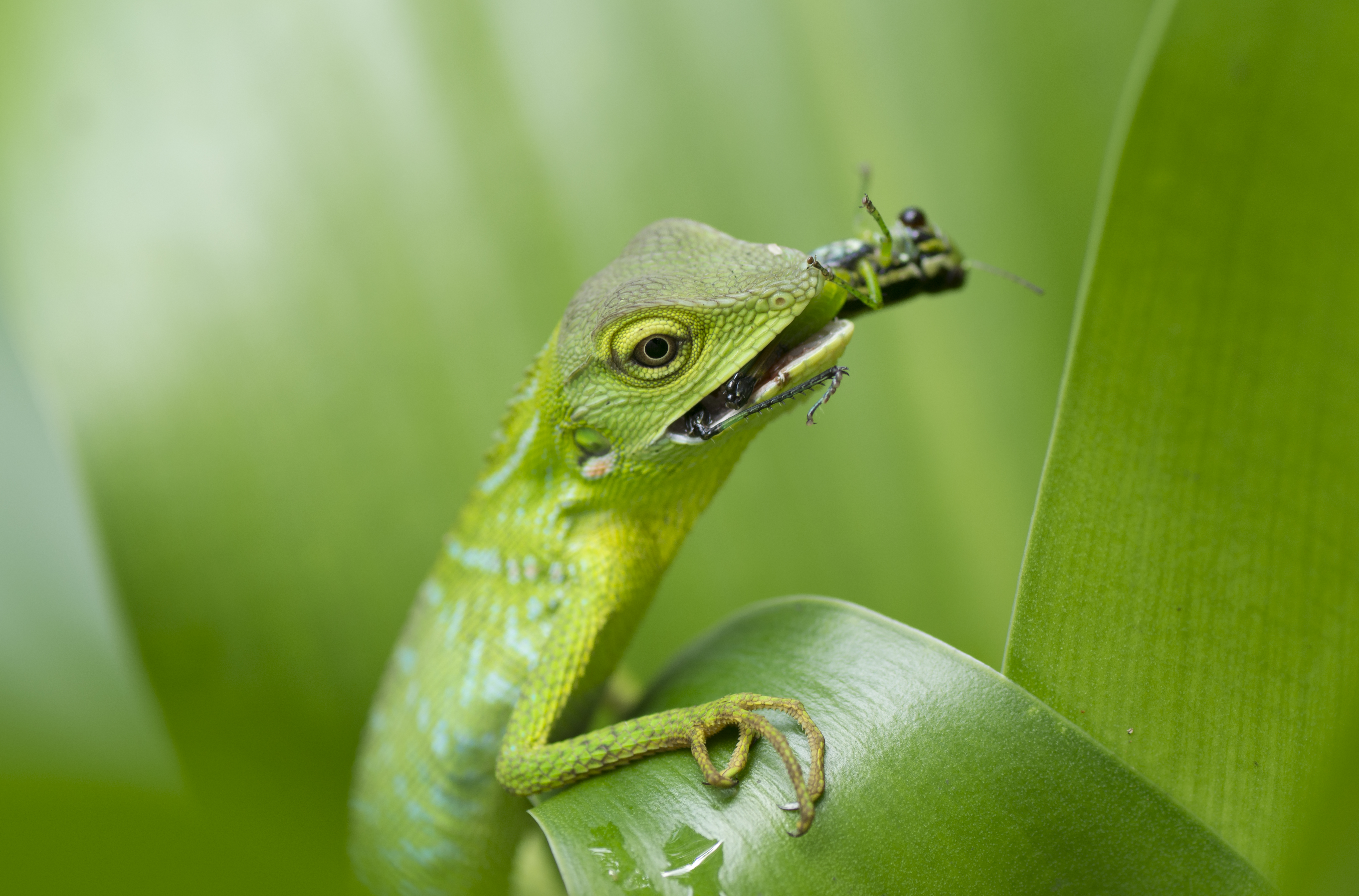 Bunglon dengan nama Inggris Great Crested Canopy Lizzard, Green Crested Lizard dan Maned Forest Lizzard cukup mudah di temui di lingkungan, mereka berkamuflase dengan cara mengubah warna kulit sesuai dengan lingkungan sebagai pertahanan diri